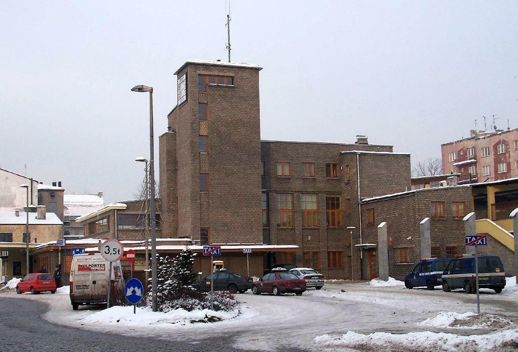 Dworzec kolejowy Będzin Miasto ... zimą, po remoncie elewacji.